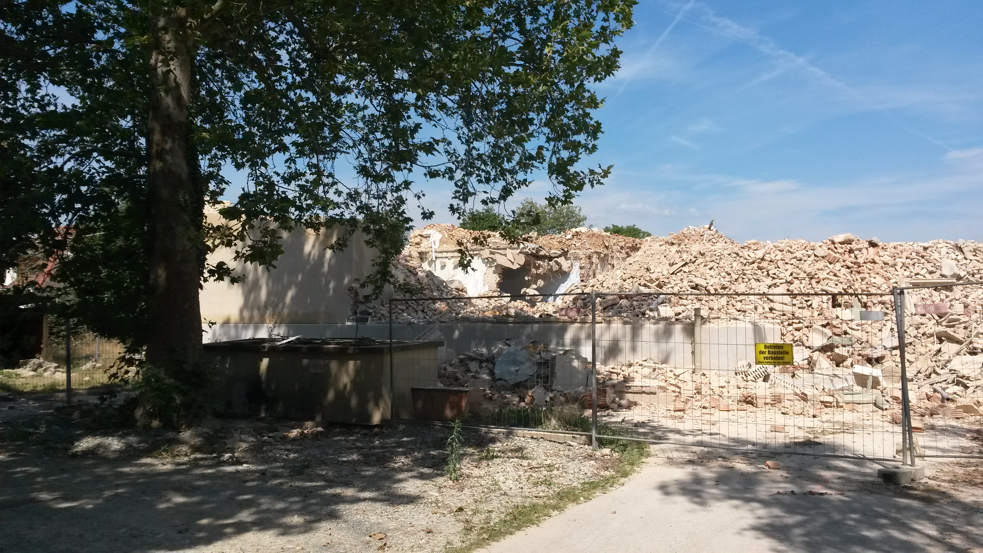 Kaserne Pinkafeld Abriss